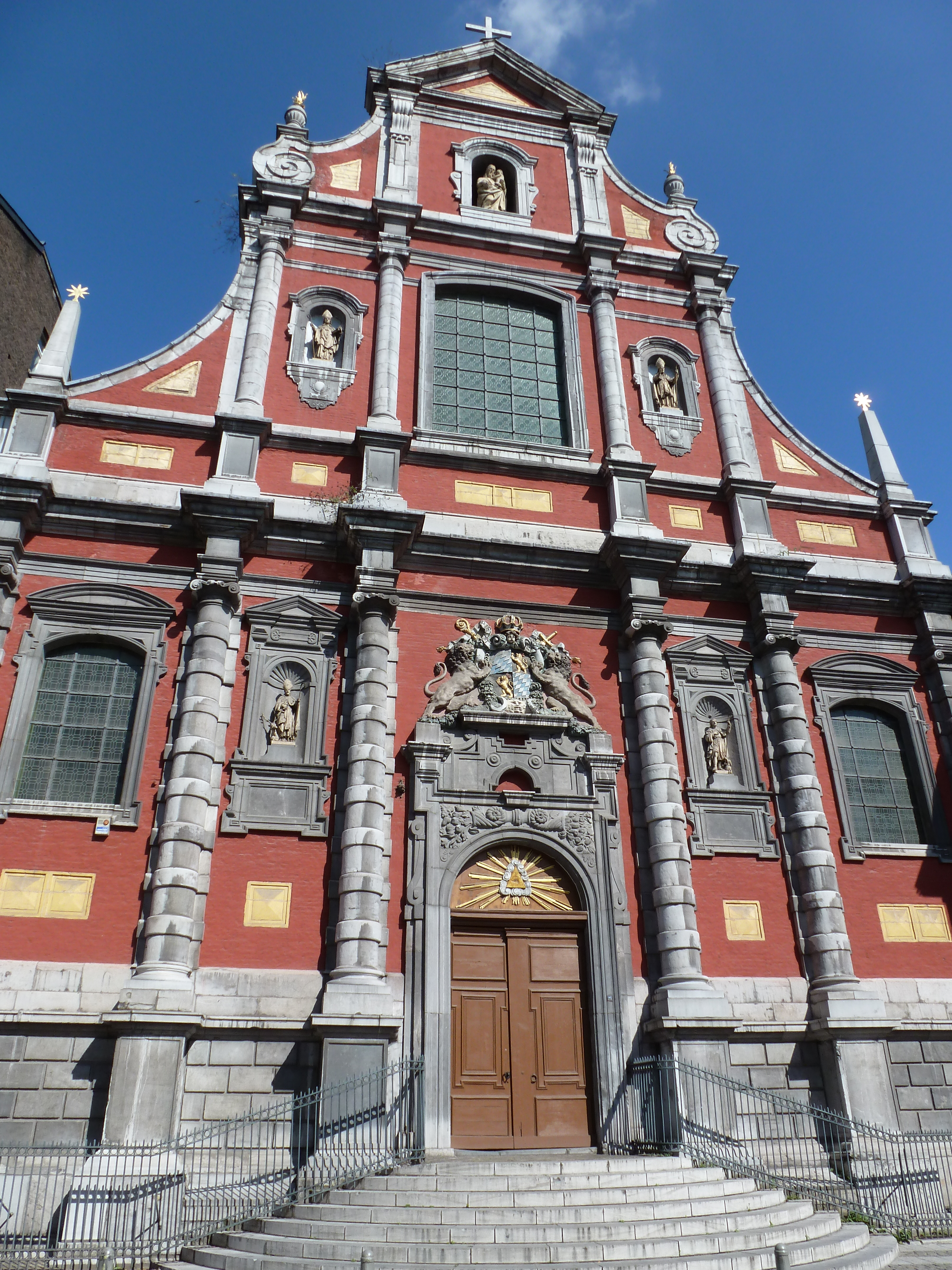 église désacralisée - autrement nommée Eglise Notre-Dame de l'Immaculée-Conception ou Eglise Saint-Gérard